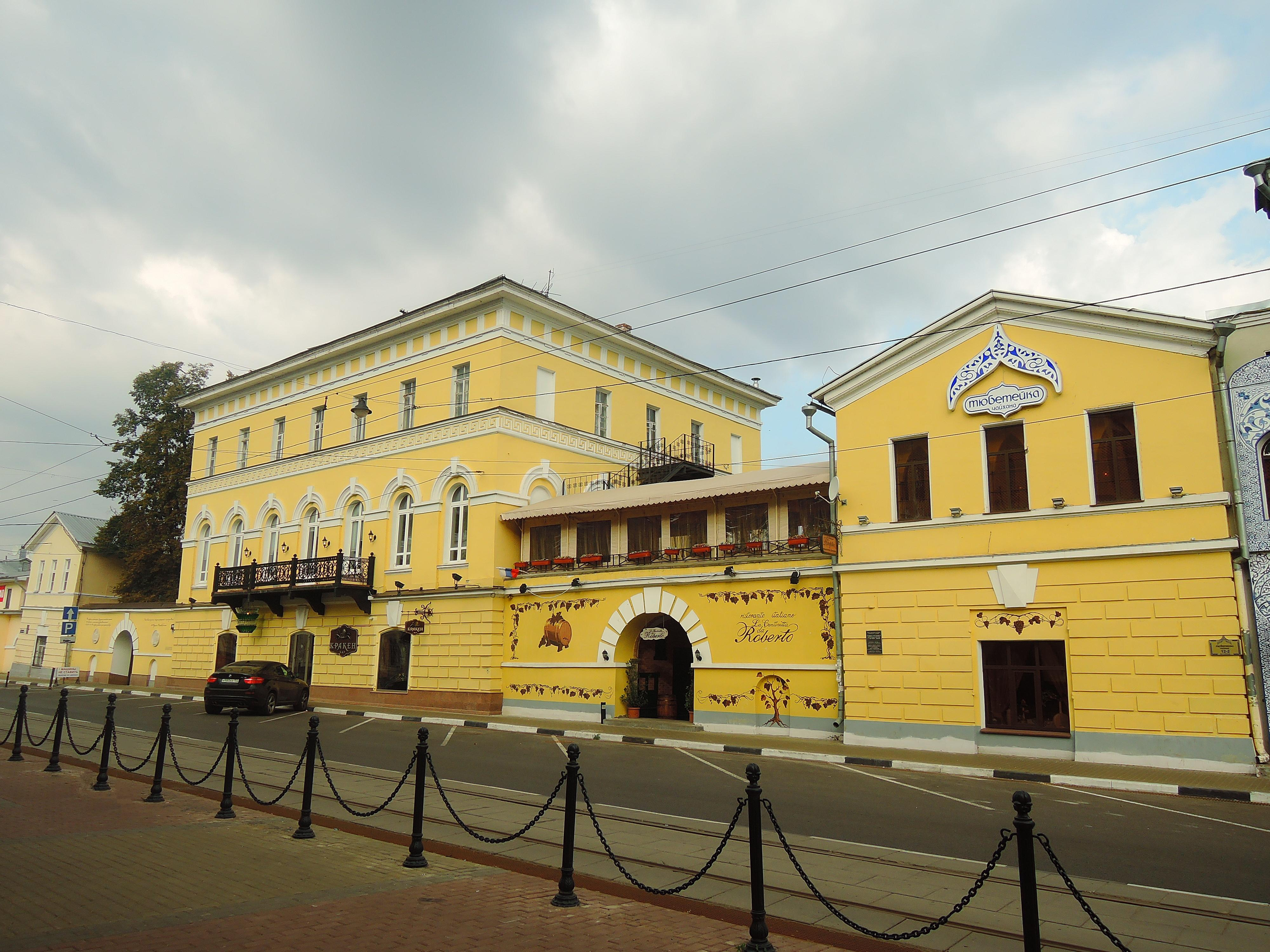 Усадьба Строгановых: улица Рождественская, 45, Нижний Новгород, Нижегородская область